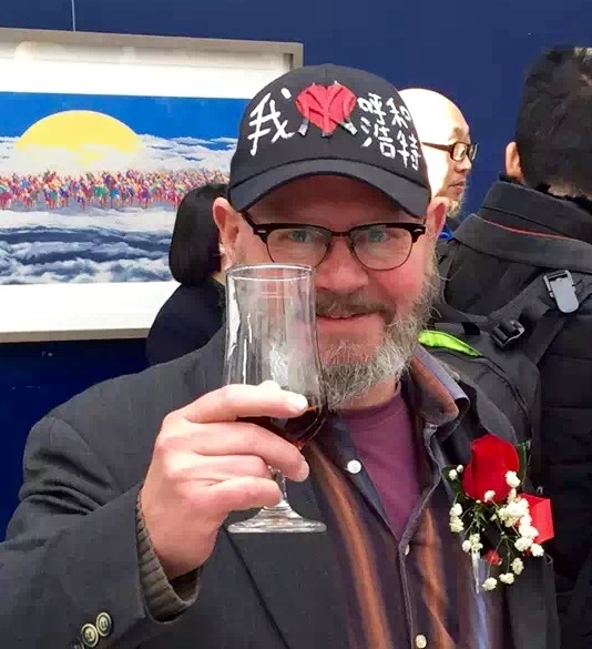 Kunstneren Lars Ravn